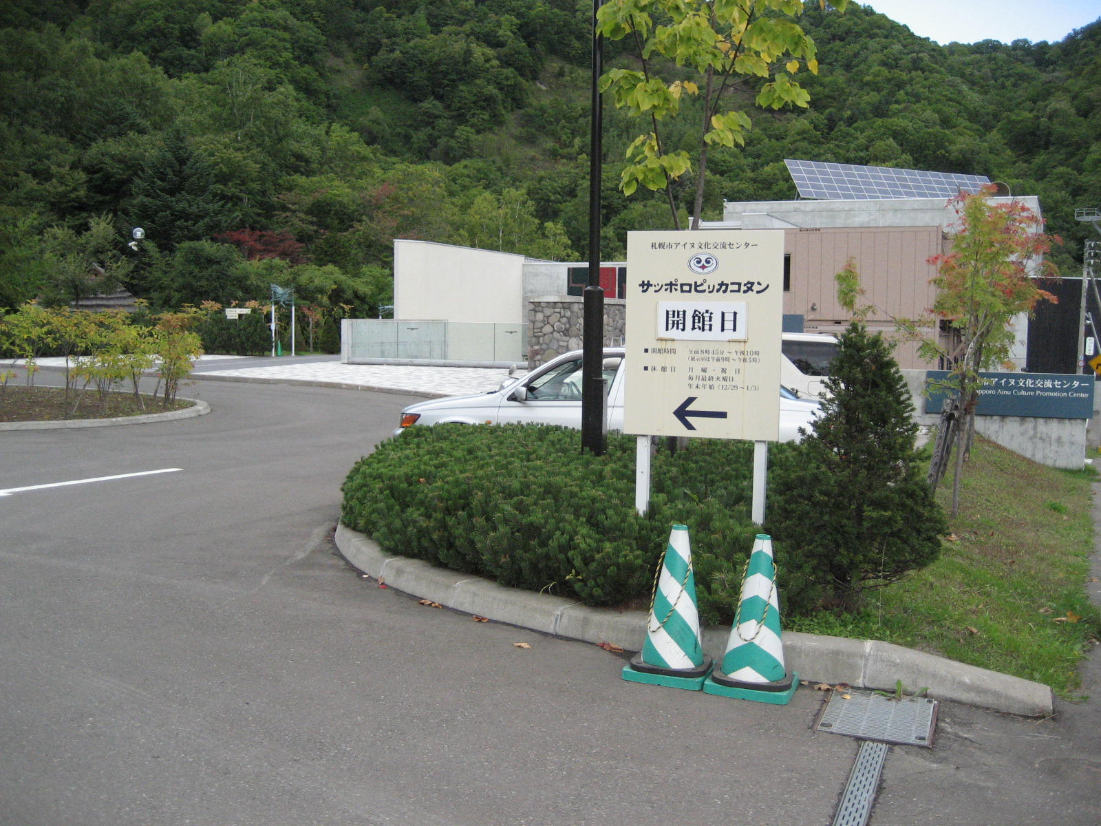 Pirka Kotan, Ainu language and cultural center in Sapporo, Hokkaido (Jozankei area)